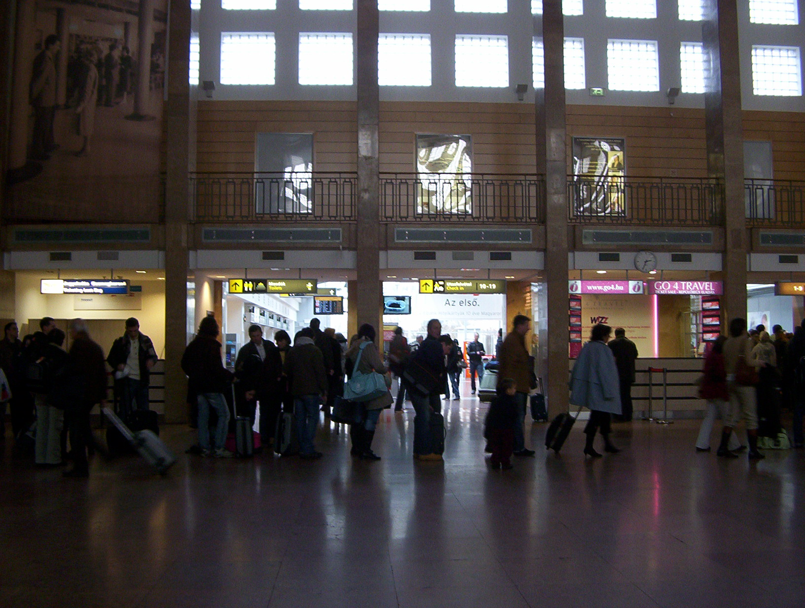 A Liszt Ferenc Repülőtér 1-es termináljának várócsarnoka, a Check-in (utasfelvételi) rész felé nézve